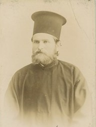 Снимка на свещеник Павел Атанасов във Варна. Снимката е подарена от свещеник Павел Атанасов на Киро Н. Ичеренски в знак на родствена връзка.